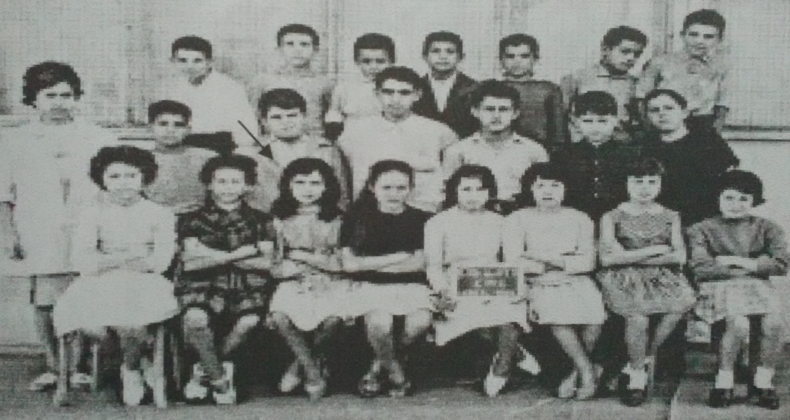 Meriem Bouatoura Etudiante